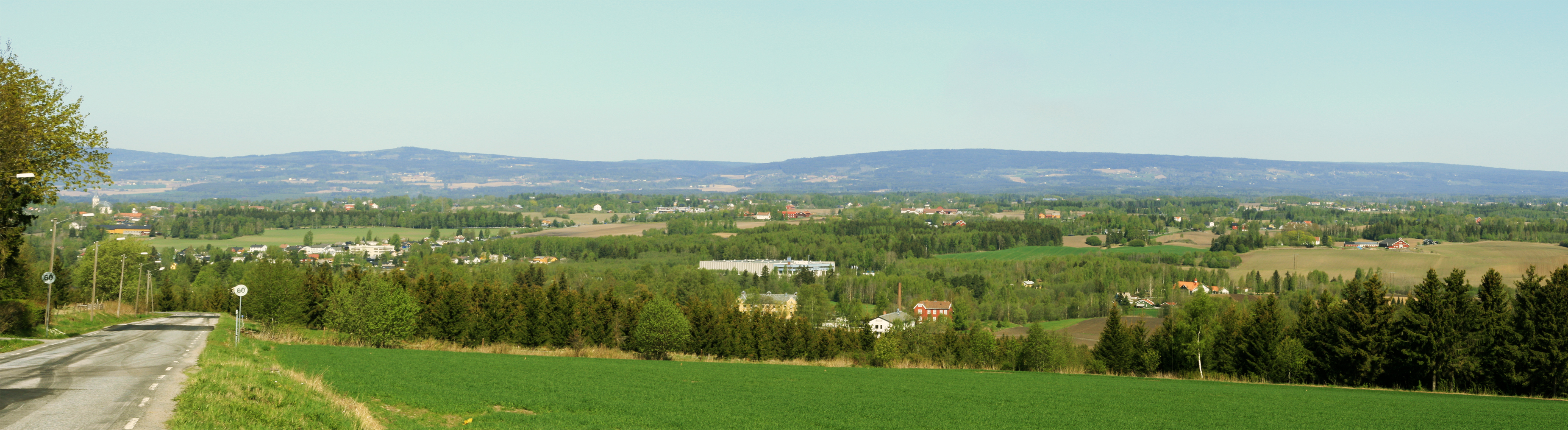 Vang, Hedmark, Norway.